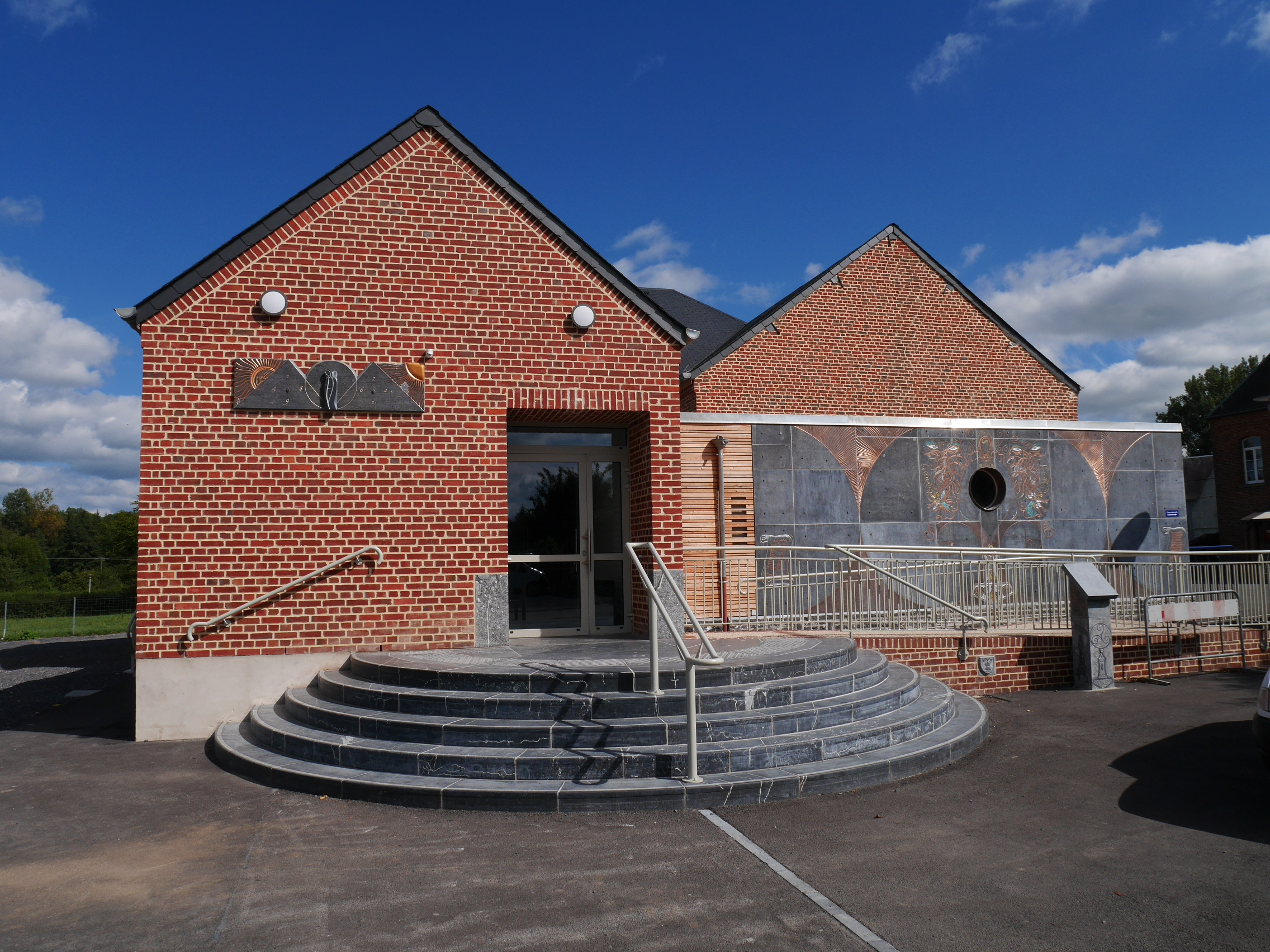 Salle des fêtes de Wallers-en-Fagne